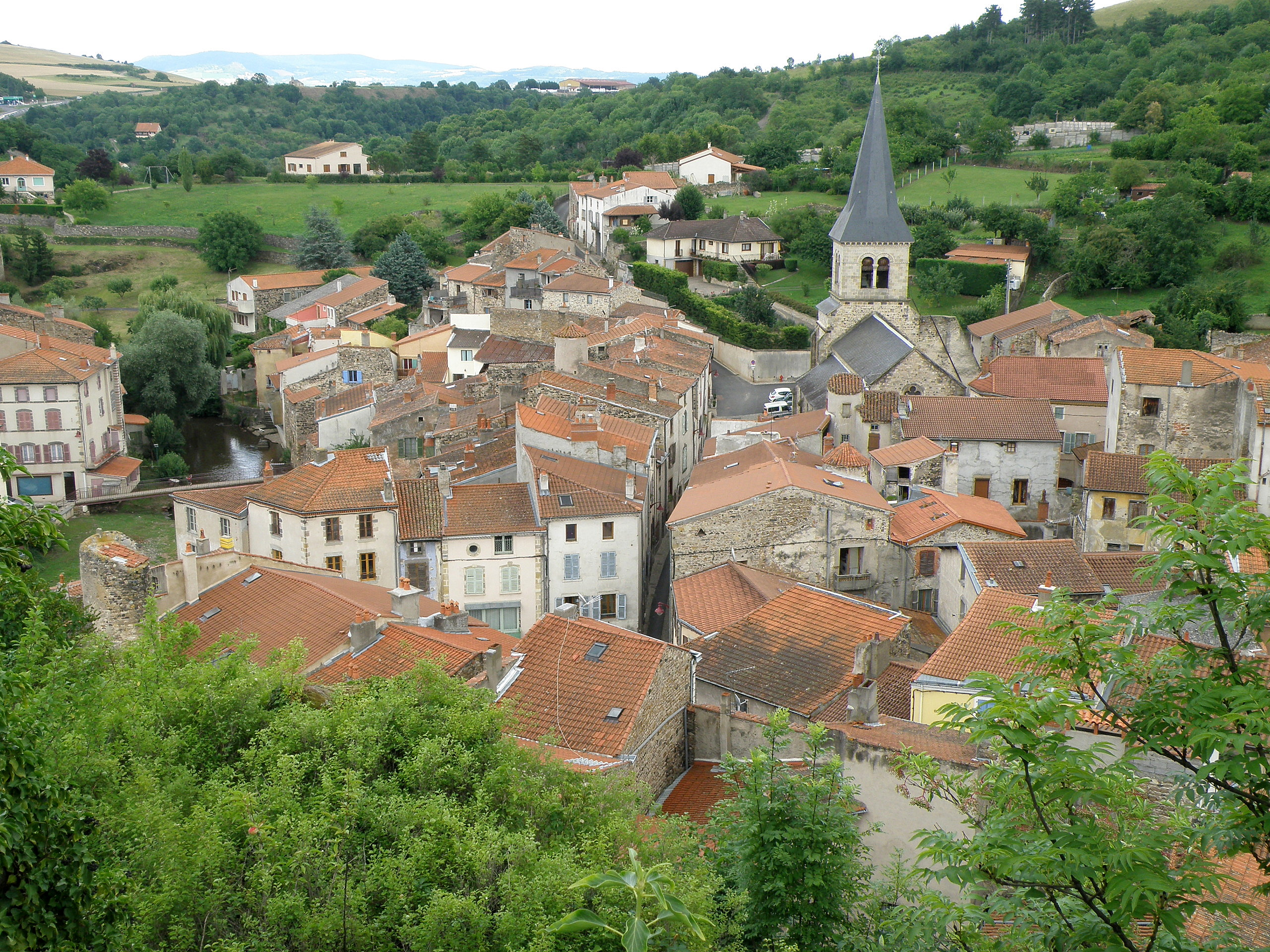 Champeix, comm. du Puy-de-Dôme (France, région Auvergne). Vue du vieux bourg (plus exactement la partie sise sur la rive droite de la rivière Couze de Chambon) depuis le château du Marchidial. À droite : église romane Sainte-Croix. La rue de l'Église traverse la photo de part en part, du bas vers le haut, d'abord entre les maisons au départ de la place de la Barreyre, dont on distingue le plan triangulaire en bas à gauche, puis se prolongeant derrière l'église en une petite rue montante. On aperçoit à gauche les eaux de la rivière Couze de Chambon, qu'enjambe la passerelle. Nous regardons vers l'est-nord-est.